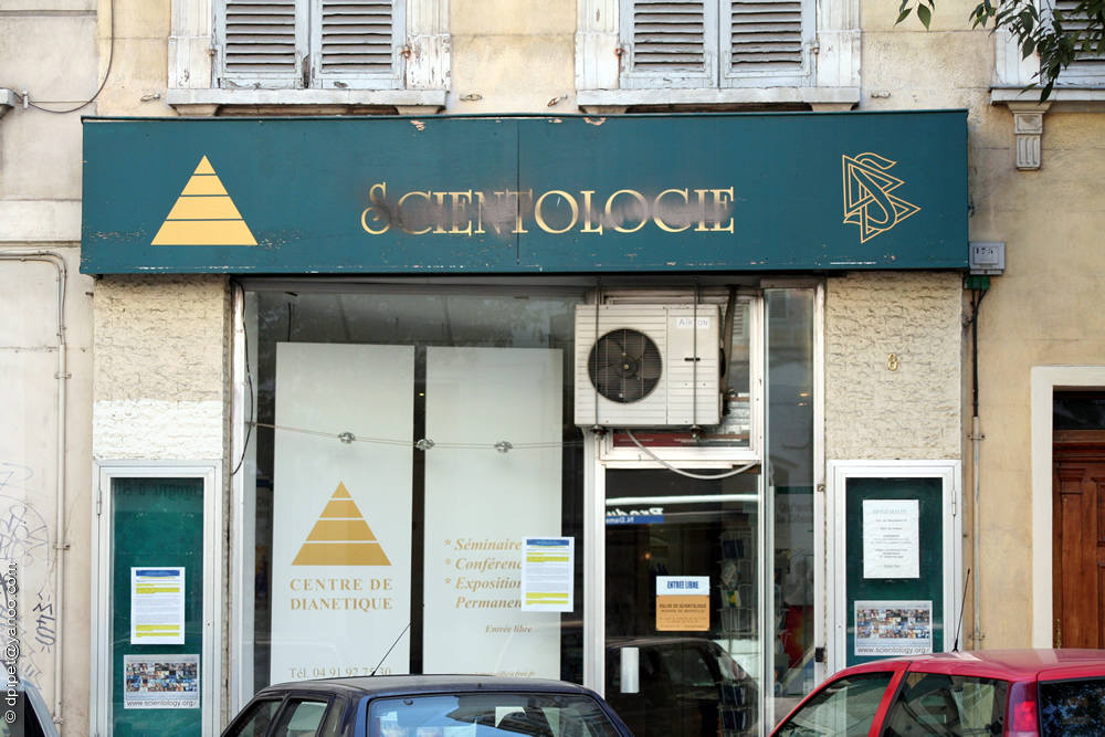 le centre de dianétique (la puissance de la pensée sur le corps) de la scientologie, à Marseille [13006]